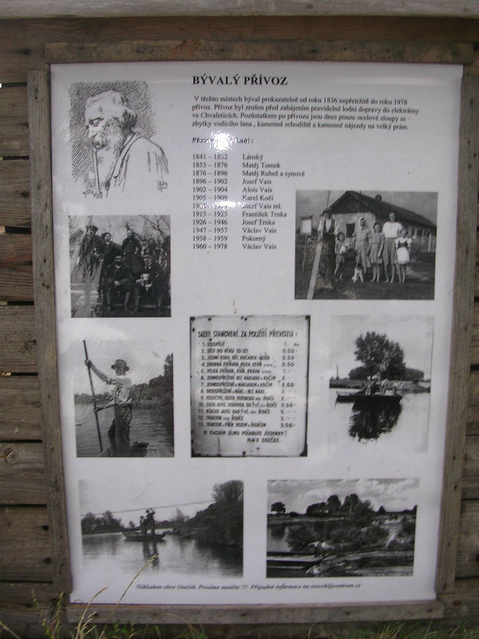 Přívoz Oseček (u Poděbrad). Informační tabule o historii přívozu, na západním břehu.